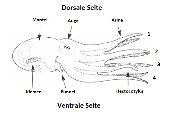 Octopodidae – Beschreibung